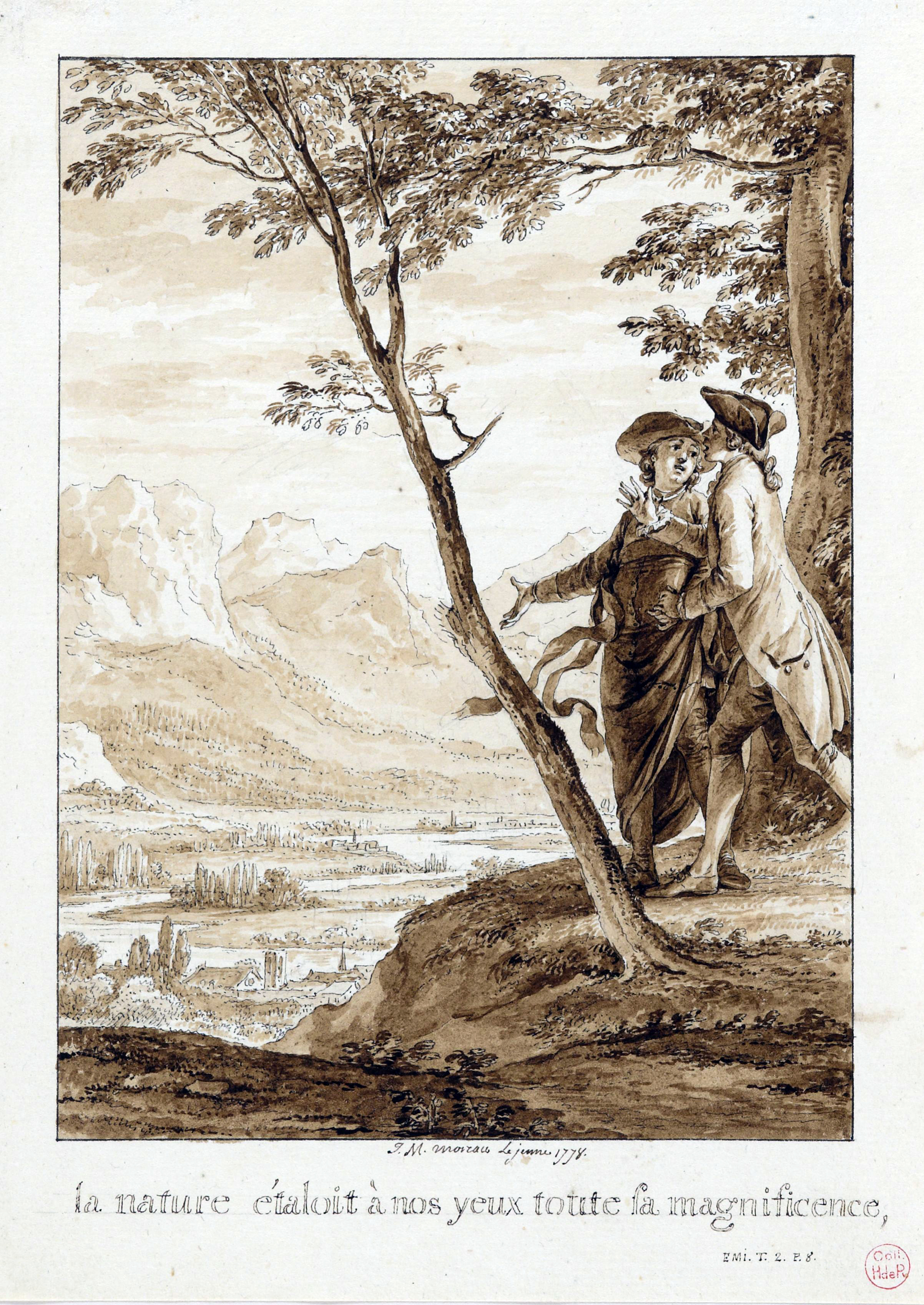 Dessin à la plume pour l'Emile de Jean-Jacques Rousseau, préparation à la gravure pour l'édition de Londres.